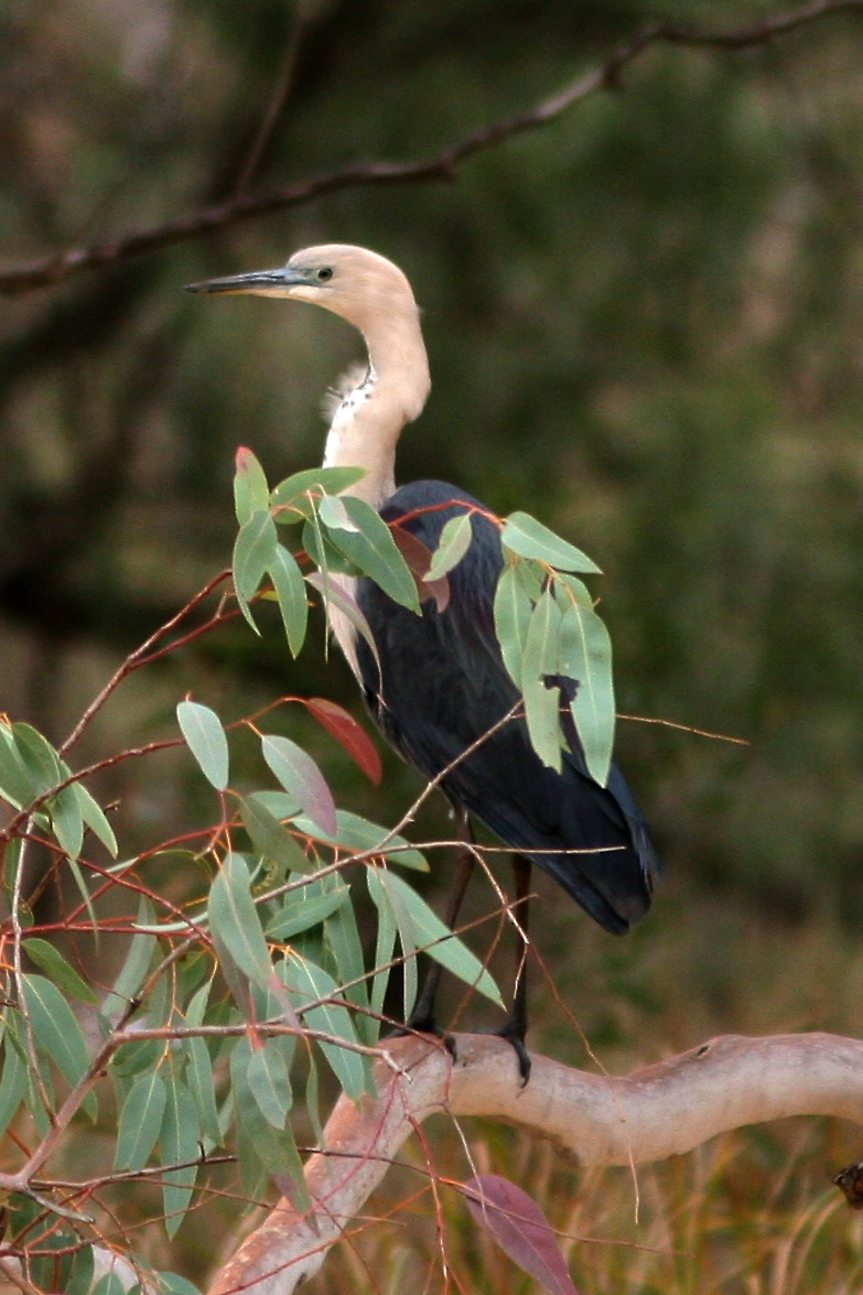 Pacific Heron, Ardea pacifica